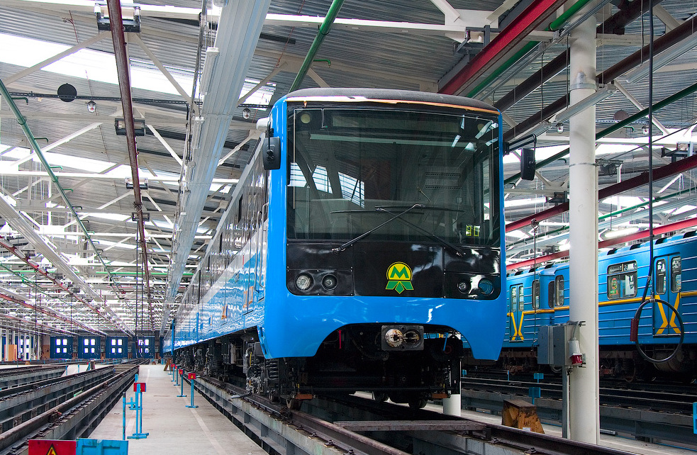 Электропоезд метрополитена 81-7036/7037 в депо Харьковское